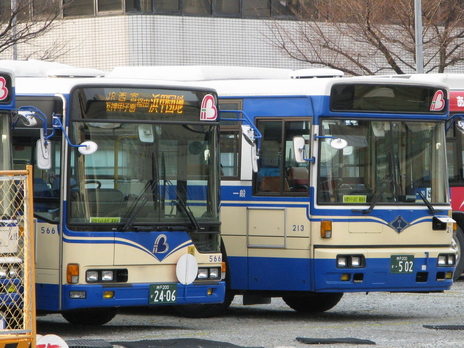 阪神バス 右は阪神電鉄バスからの承継車で、正面に阪神電鉄の社紋が入る。左は阪神バス自社発注車で、正面に入るのはロゴマーク。阪神西宮駅前の車庫にて（敷地外からズーム撮影）